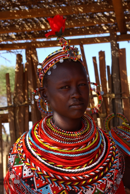 Femme samburu à la rose - documentaire Umoja, le village interdit aux hommes de Jean Crousillac et Jean-Marc Sainclair.